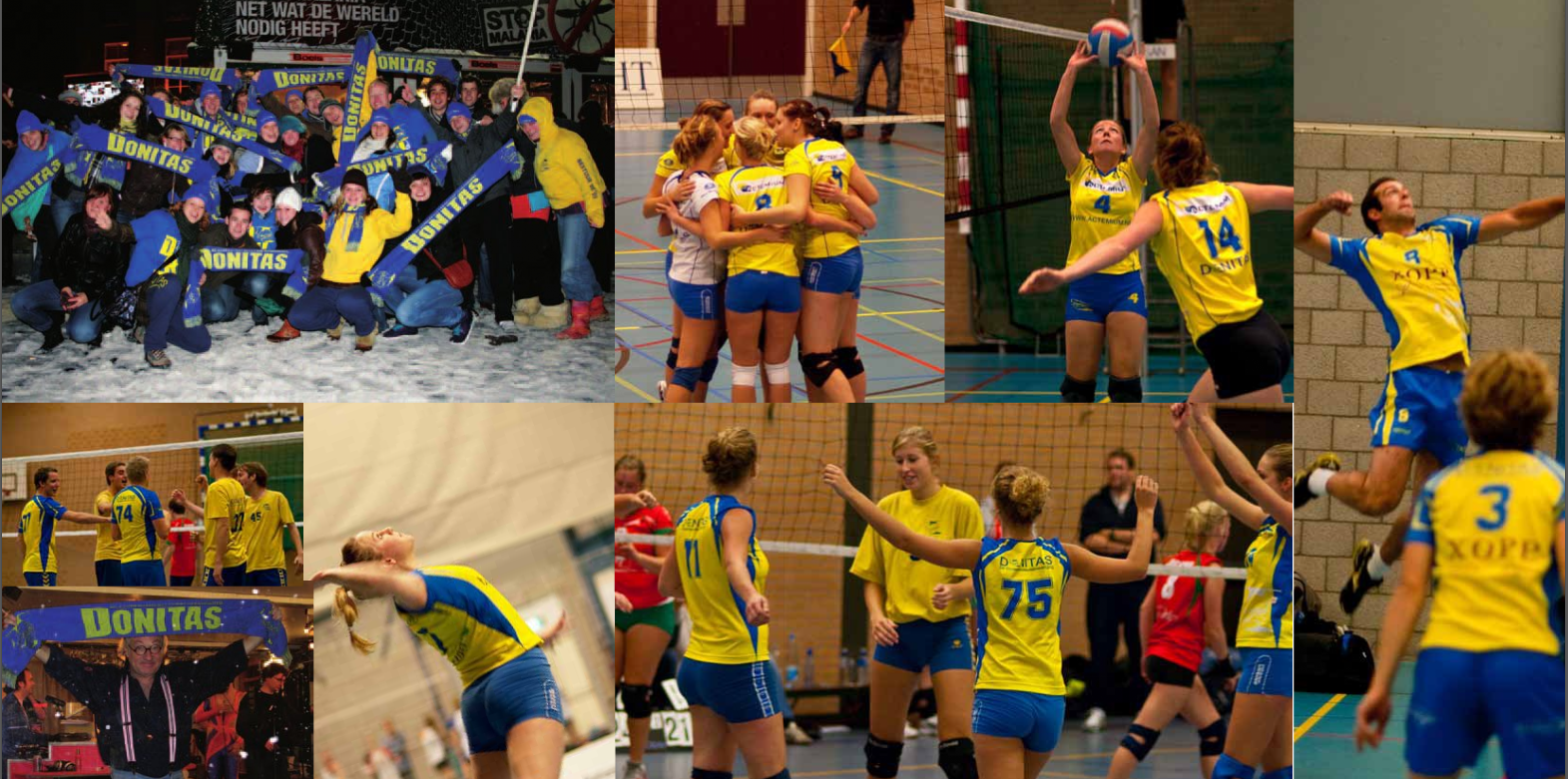 impressie Donitas